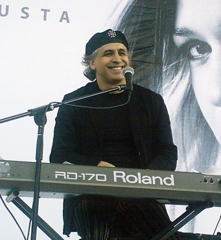 En vivo